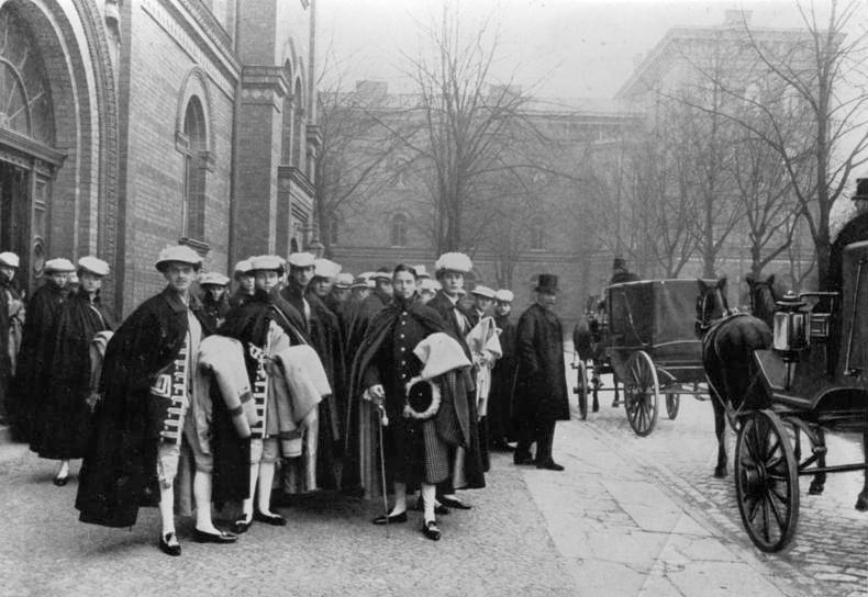 Im Pagendienst Dem Pagenkorps anzugehören ist ein altes Vorrecht des adligen Kadetten. Ein besonderer Vorzug ist es, Leibpage einer dem kaiserlichen Hause angehörenden hohen Persönlichkeit zu sein, was sich an der kleidsamen Pagentracht durch silberne Tressen kenntlich macht. Im Winter, wenn die Hoffestlichkeiten die Pagen zum Dienst ins kaiserliche Schloß rufen, bringt eine lange Wagenkolone die in warme Mäntel gehüllte Pagenschaar von der Lichtenfelder Pagenkammer nach dem Orte ihrer Tätigkeit, wo sie manche schöne Erinnerung ins Leben mit hinausnehmen können.